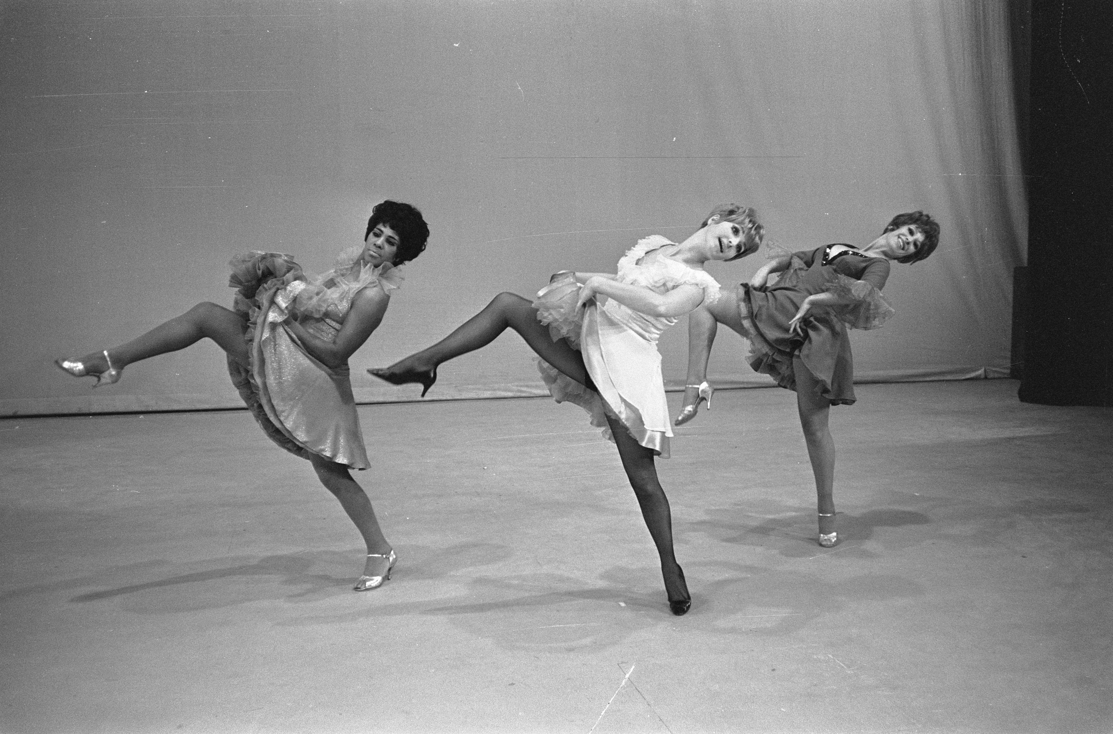 Collectie / Archief : Fotocollectie Anefo Reportage / Serie : [ onbekend ] Beschrijving : Musical "Sweet Charity" Spaanse dans, v.l.n.r. Milly Scott , Jasperina de Jong , Ronny Bierman Datum : 28 november 1968 Trefwoorden : artiesten, dansers, musicals Persoonsnaam : Bierman, Ronnie, Jong, Jasperina de, Scott, Milly Fotograaf : Koch, Eric / Anefo Auteursrechthebbende : Nationaal Archief Materiaalsoort : Negatief (zwart/wit) Nummer archiefinventaris : bekijk toegang 2.24.01.05 Bestanddeelnummer : 921-8945